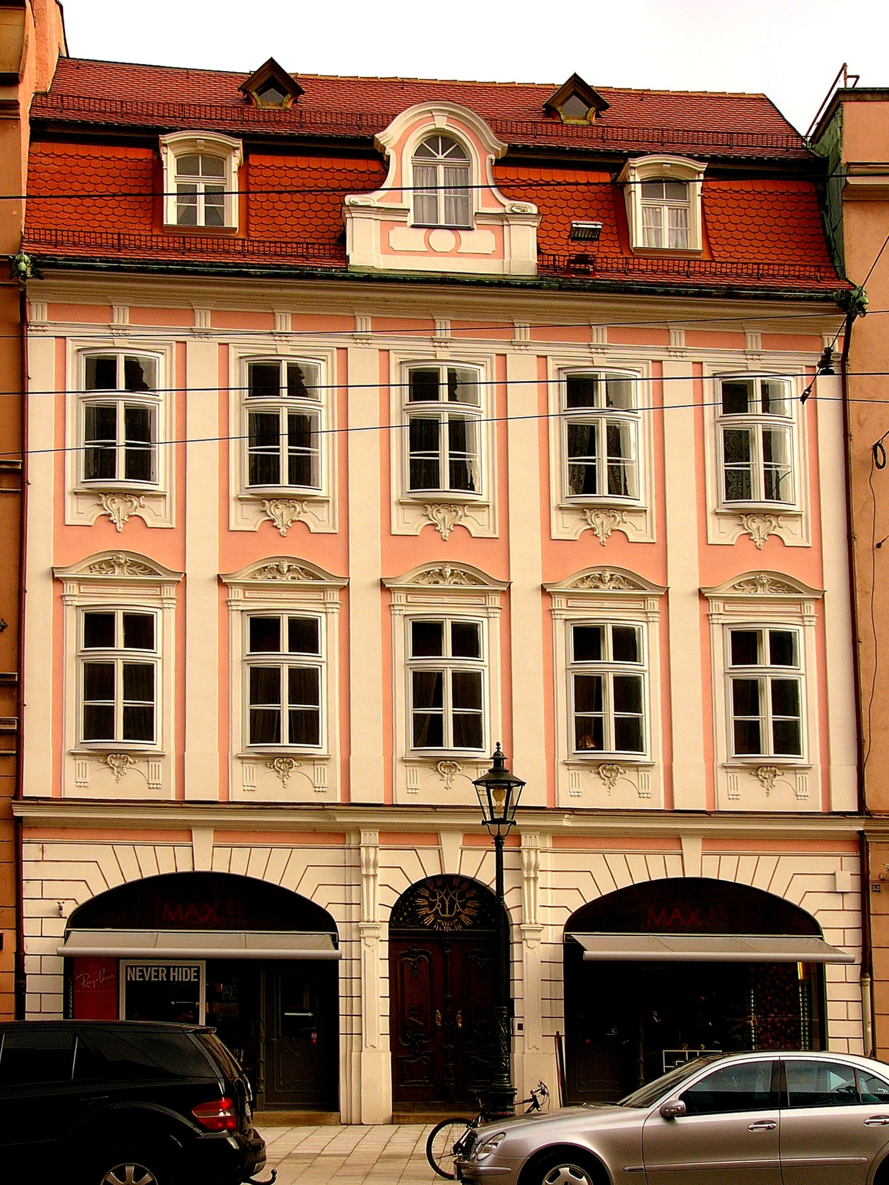 Bürgerhaus, sog. Roeck-Haus; dreigeschossiger Traufseitbau mit Mansarddach und Rokokofassade, Rückfront zur Wintergasse bez. 1770, von Johann Martin Pentenrieder, 1768/70; mit Ausstattung; Brunnen, bez. 1730; im Innenhof.This is a photograph of an architectural monument.